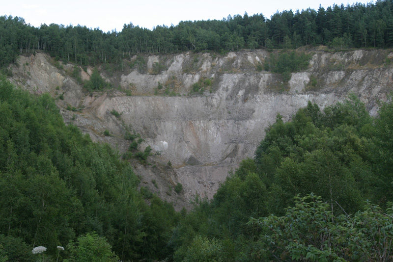 Hubský peň